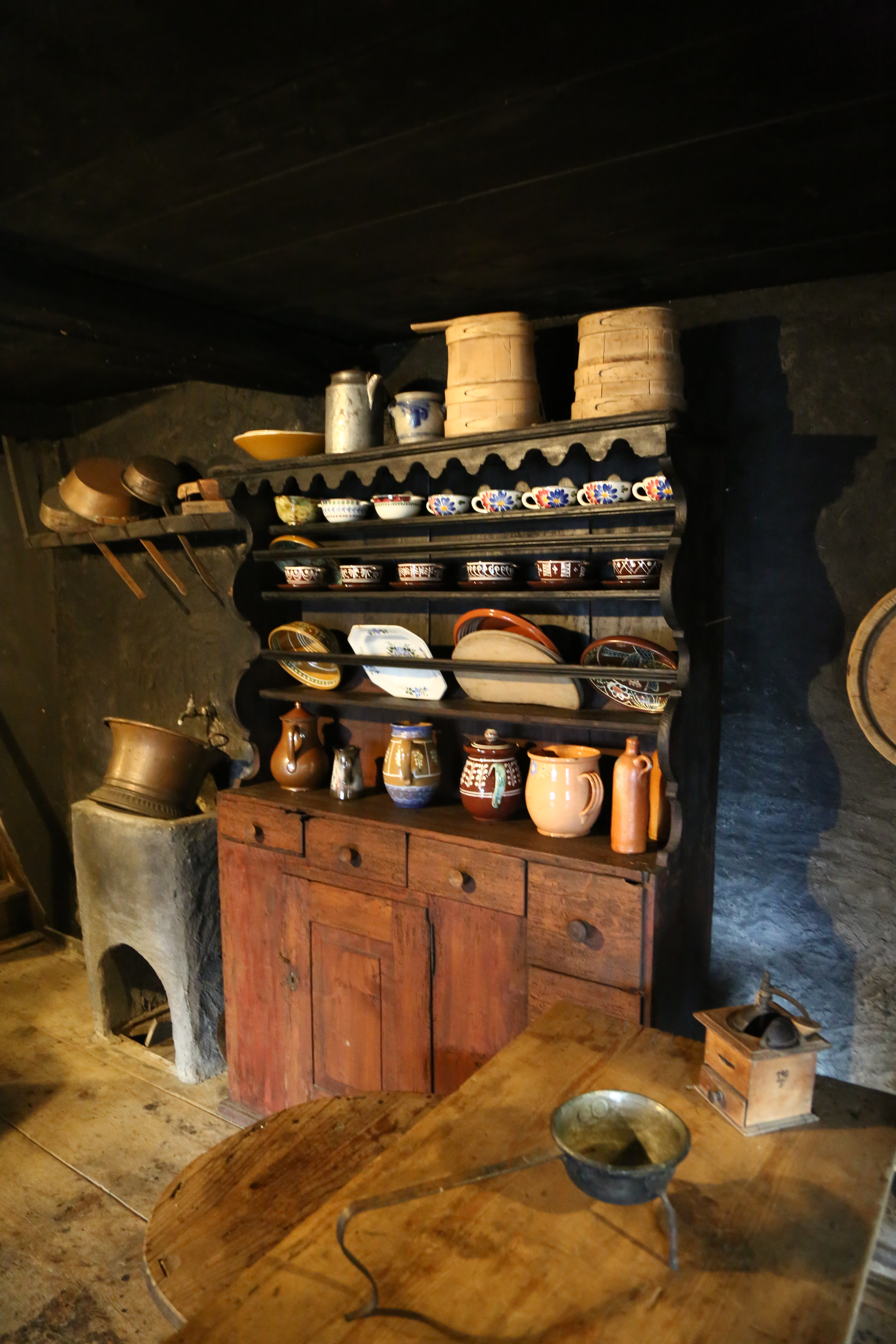 Walserhaus Triesenberg, Innenraum